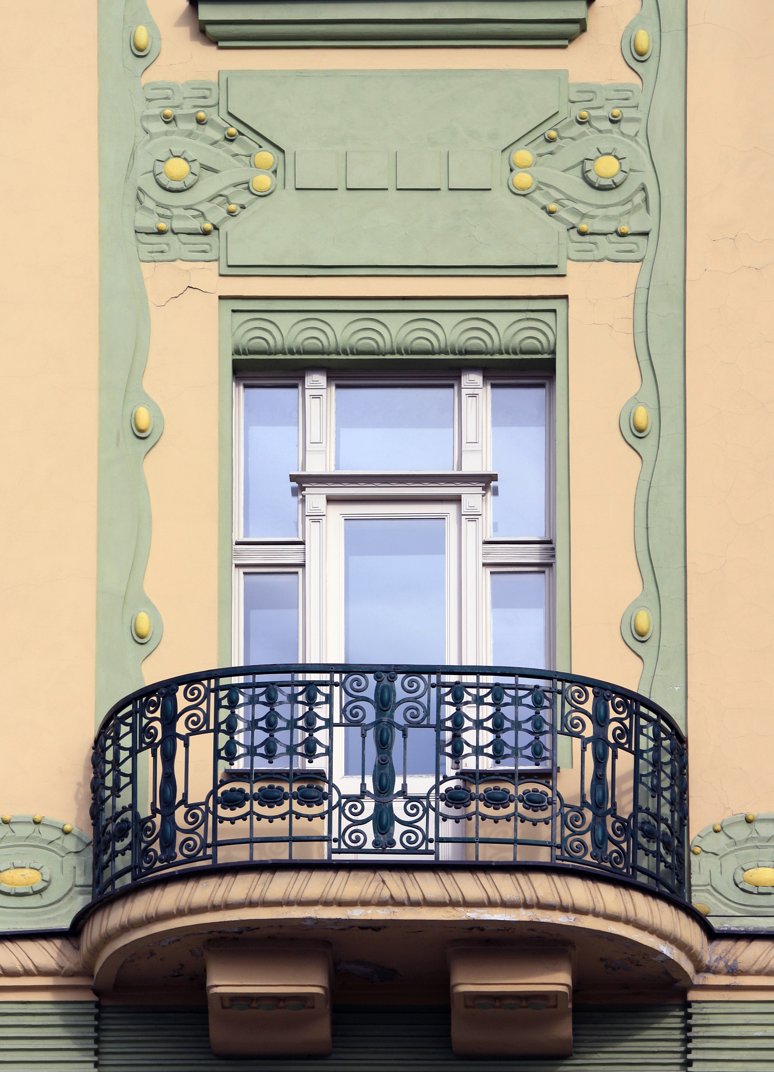 Praha, Smíchov, Zborovská 1204/10.